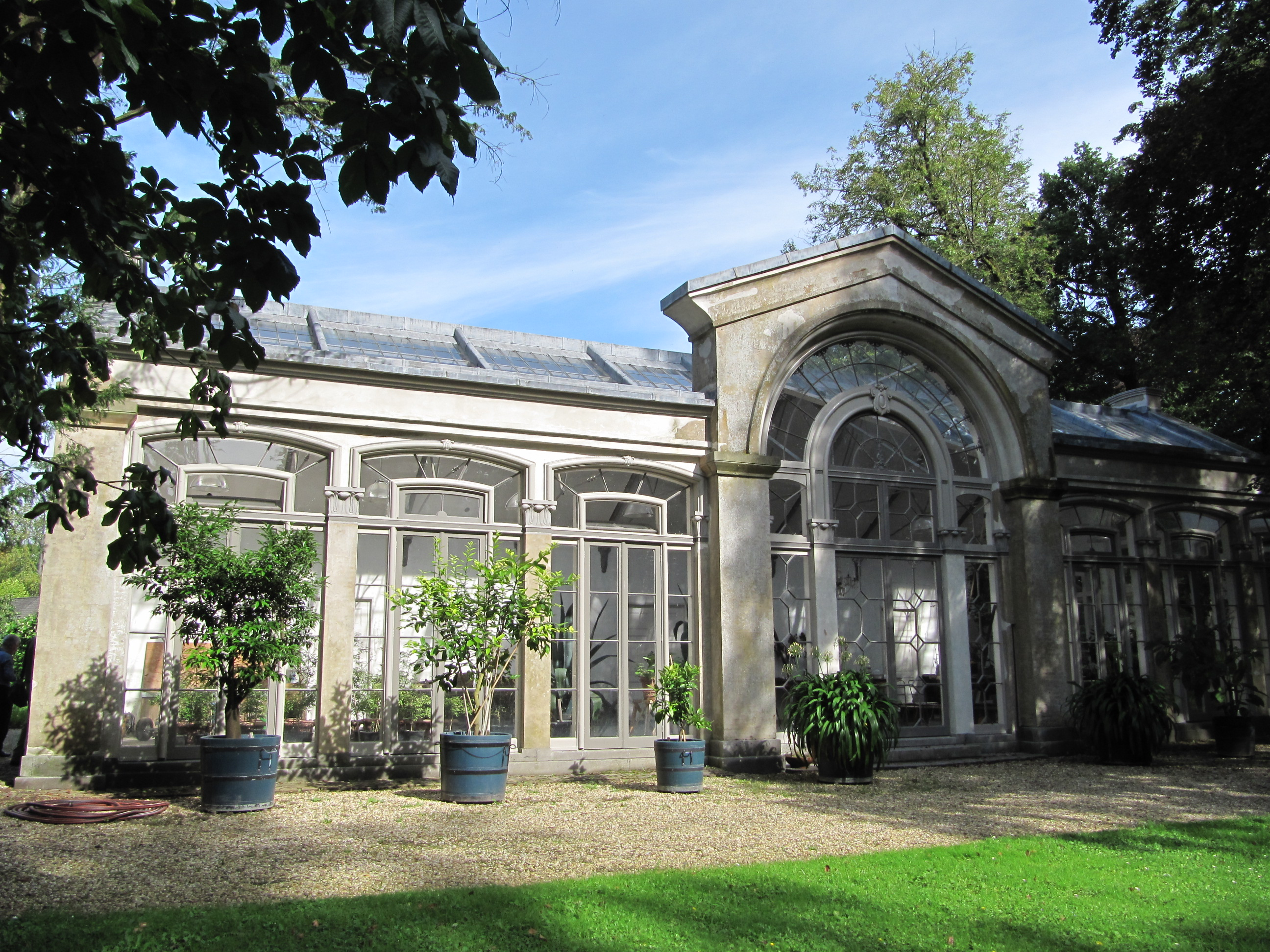 RM497173 Dordwijk - oranjerie (foto 1).jpg